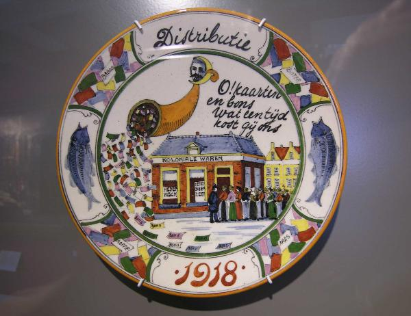 Remembrance plate for the 1917 potato riots in Amsterdam, mocking Minister Folkert Posthuma.Herinneringsbord aan het Aardappeloproer van 1917 in Amsterdam.